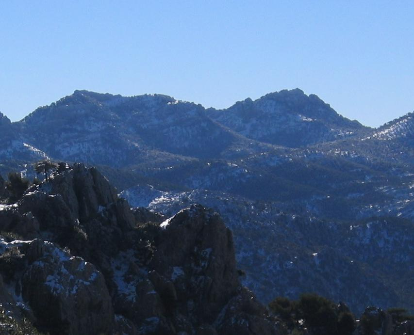 Cerro de Cabañas 2027m en la Sierra de Cazorla